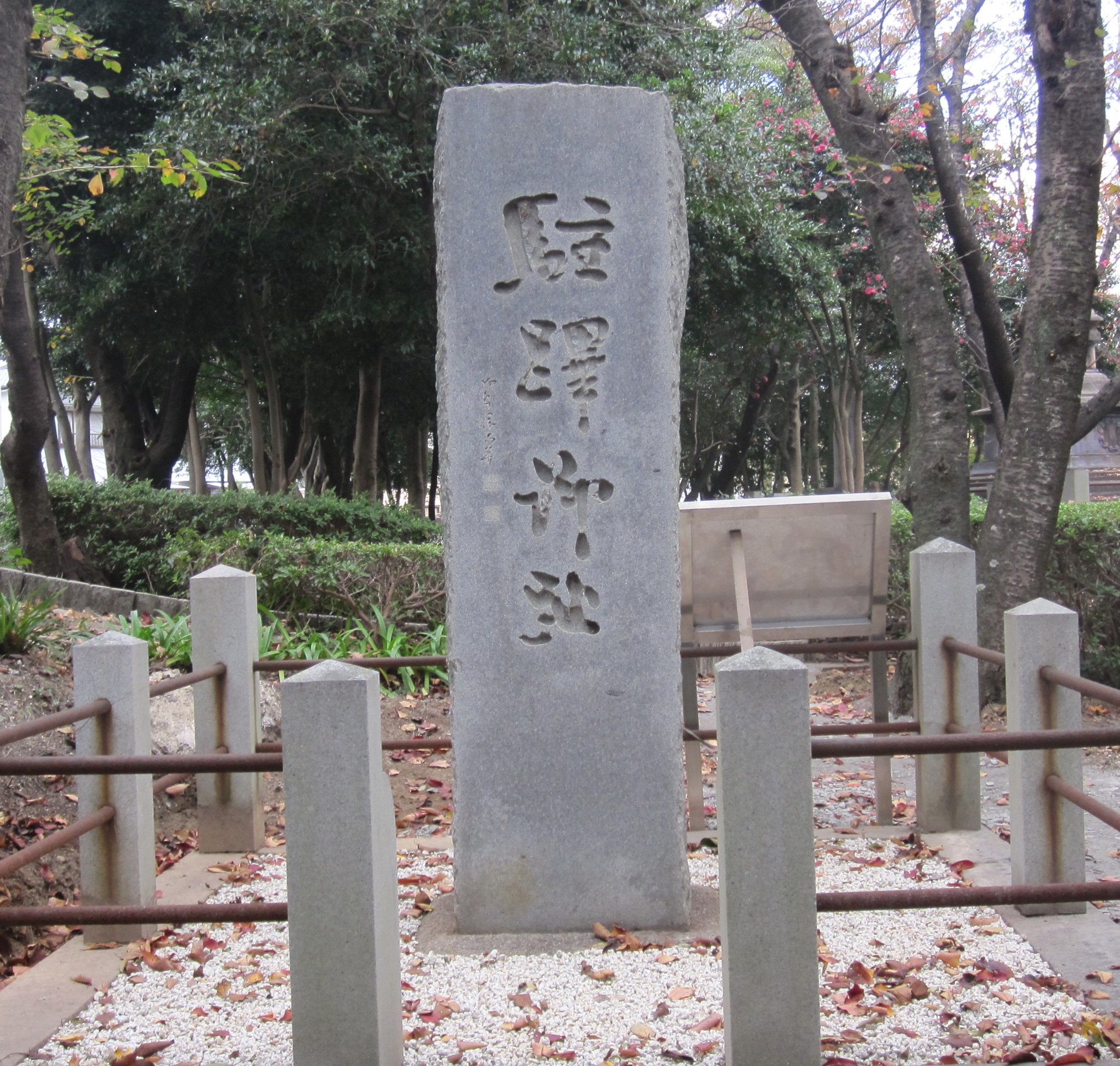 白山公園にて保存用資料として撮影